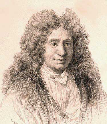 Michel-Richard Delalande (1657=1728) compositeur français.